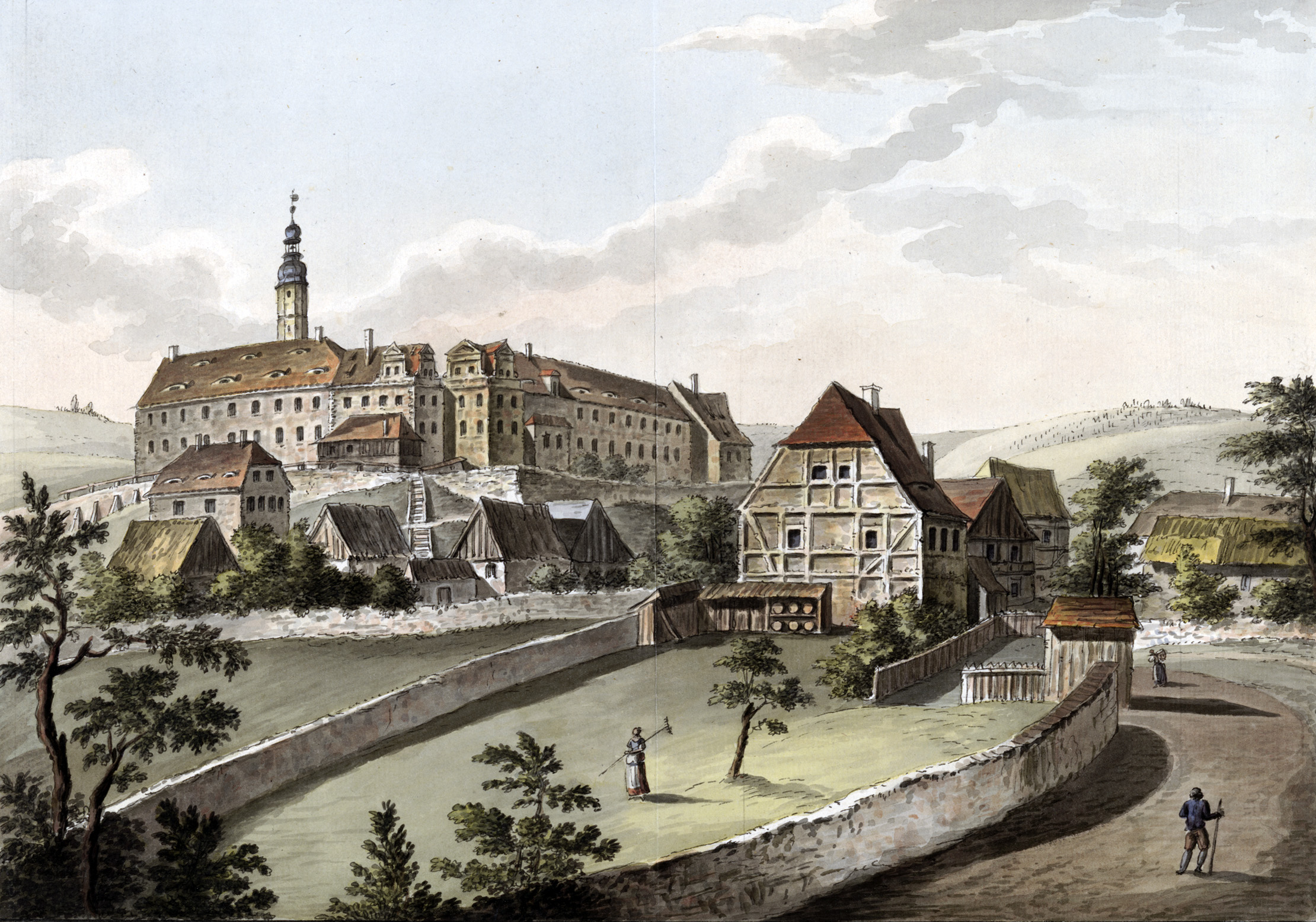 Ansicht von Schloss Schieritz bei Zehren, Handzeichnung, 1793, 1 Kunstbl.:kolor.,36 x 26 cm